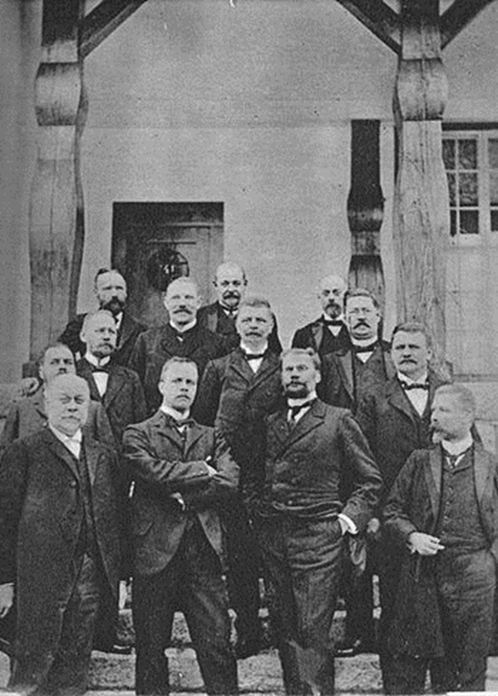 Kagaalin jäseniä Espoossa, Träskändan kartanossa 10.4.1903. Eero Erkko toisena oikealta, P. E. Svinhufvud takana oven edessä ja Eduard Polón oikealla toisena ylhäältä.